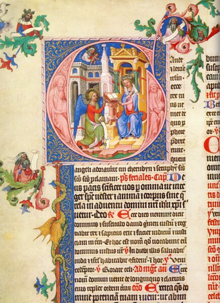 ZVěstování